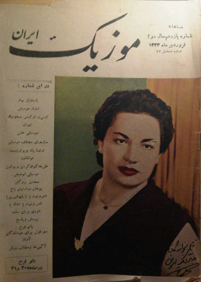 جلد مجله موزیک ایران - ۱۳۳۳ خورشیدی